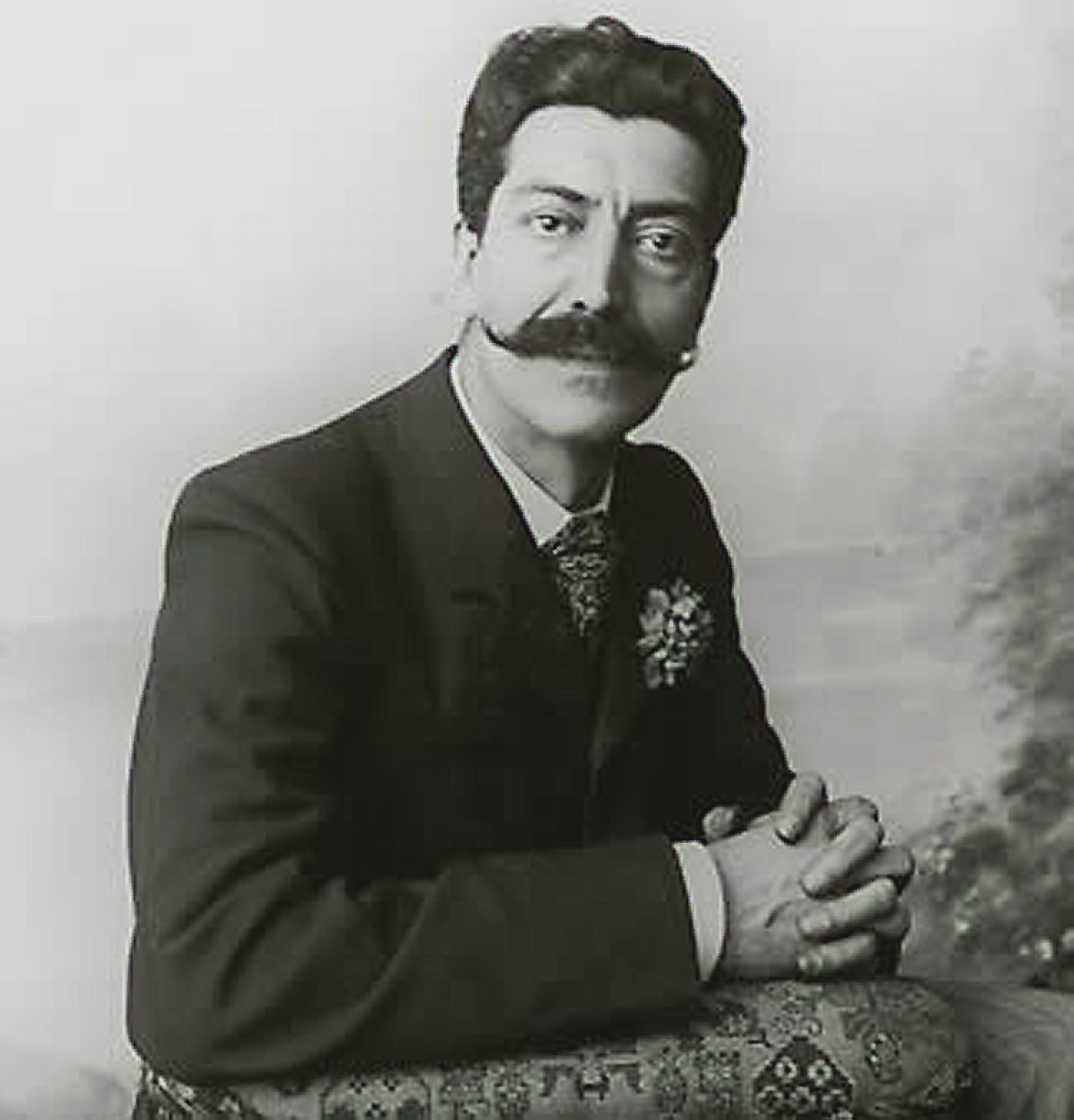 Paz dos Reis